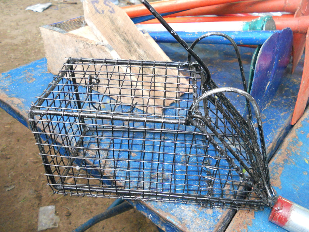 Rat trap